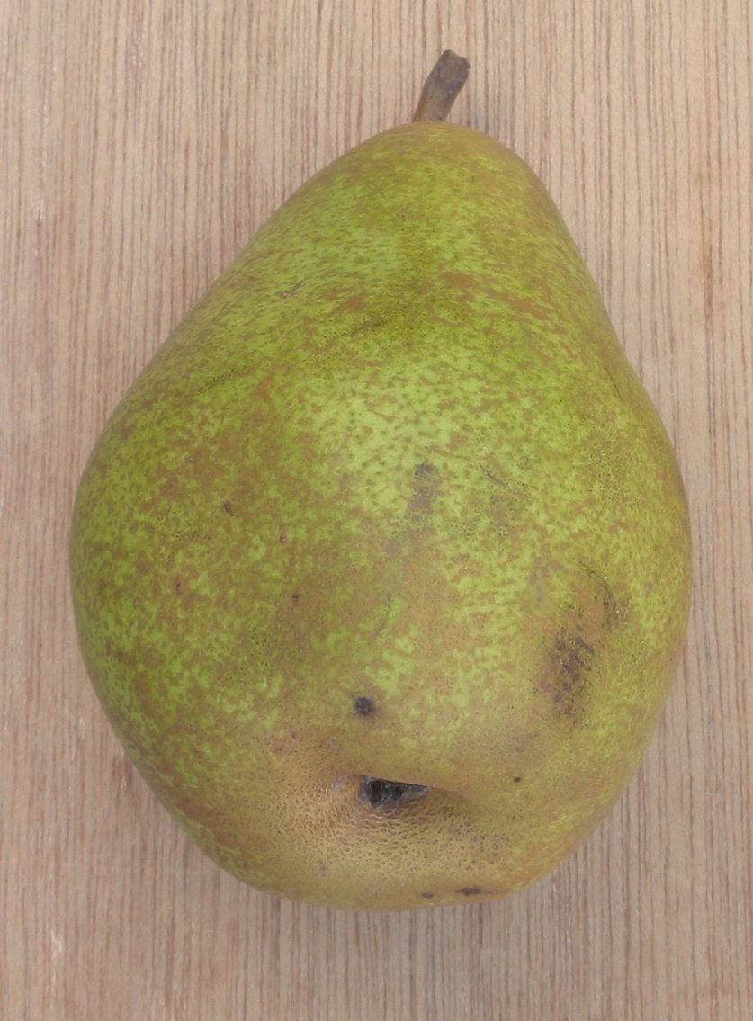 Pyrus communis 'Doyenné du Comice'